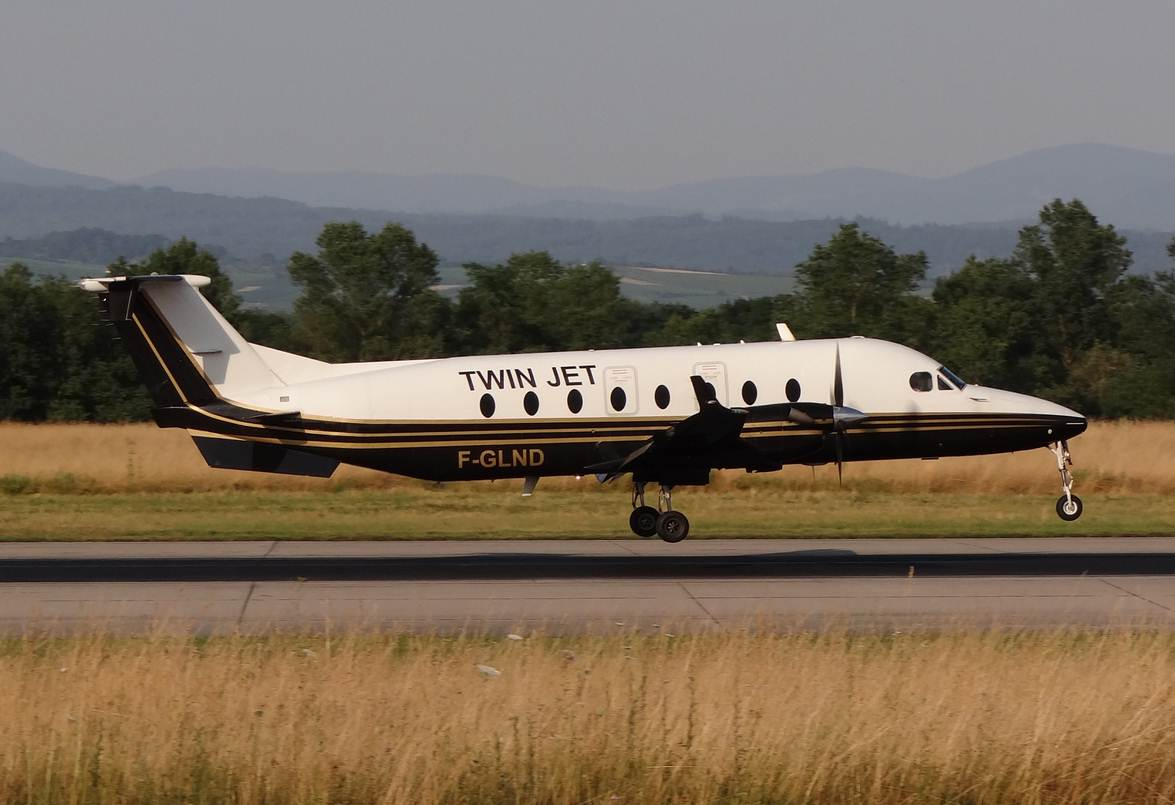 Beech 1900 Twin Jet